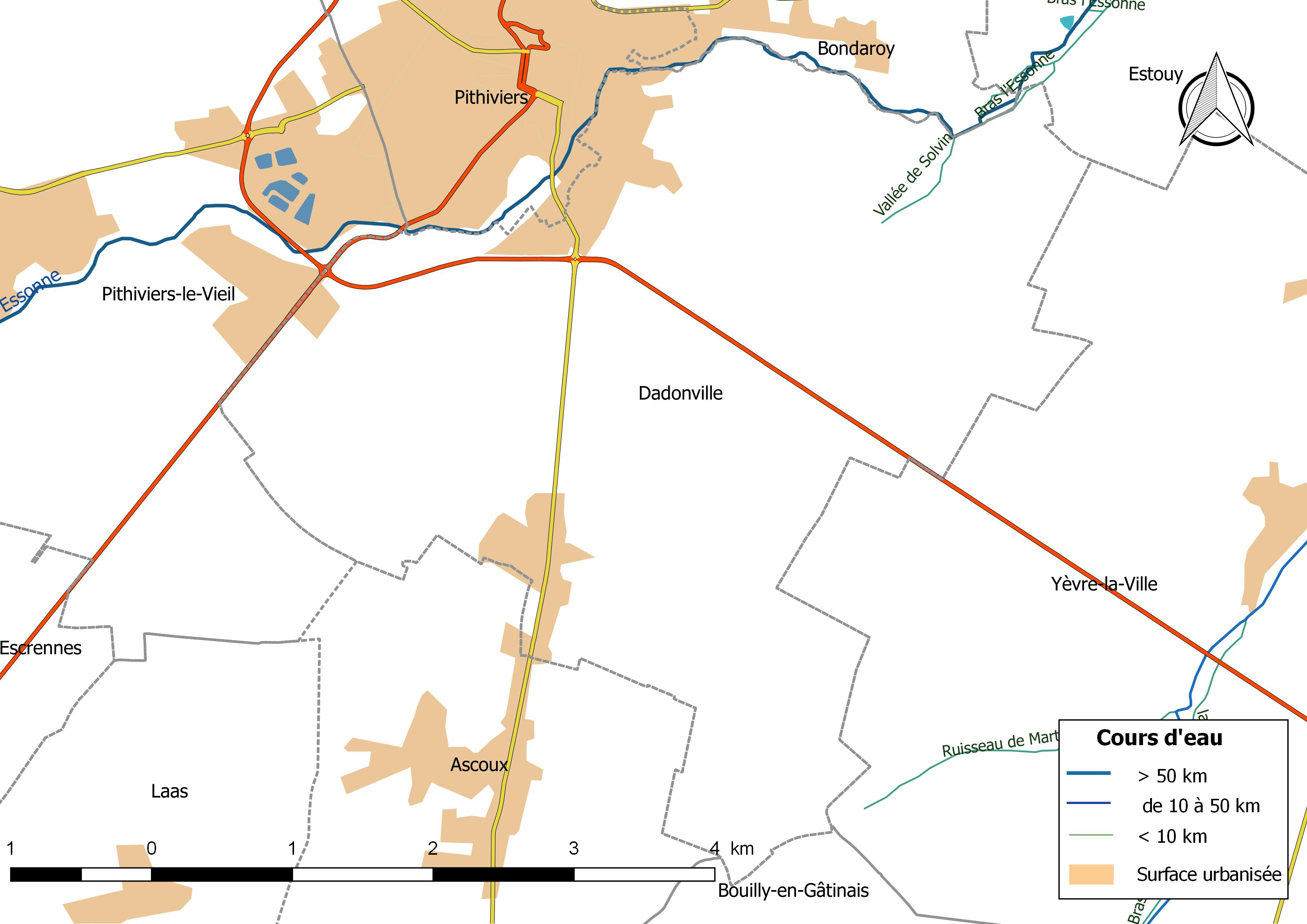 Carte du réseau hydrographique de la commune de Dadonville (France).